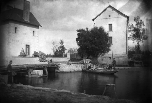 Rives de la Choisille, un moulin et ses propriétaires, à Saint-Cyr-sur-Loire en 1855.